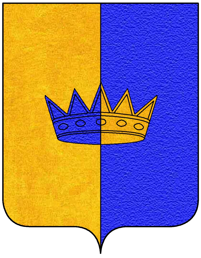 Stemma della famiglia Corner